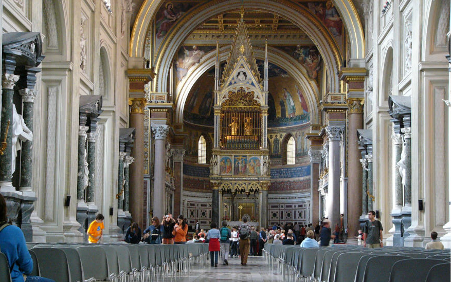 Das Bild zeigt den Innenraum der Lateransbasilika in Rom.